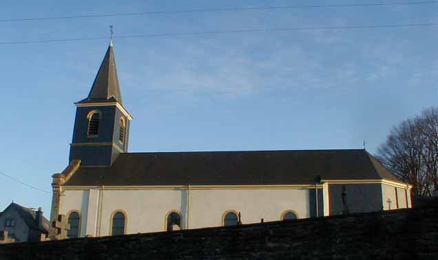 Walon: Eglijhe di Sint-Medåd